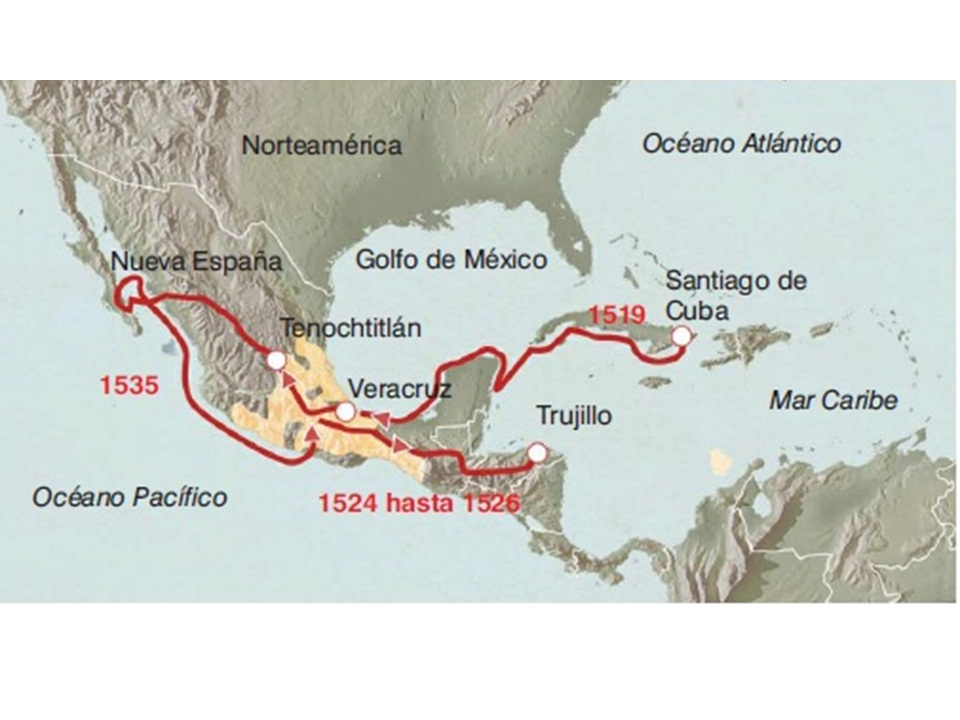 caminho